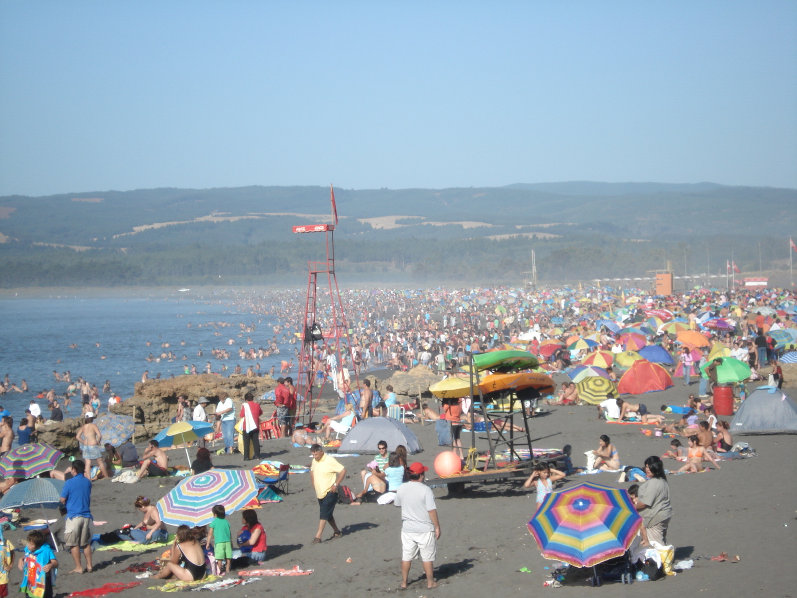 Pichilemu Beach 2008